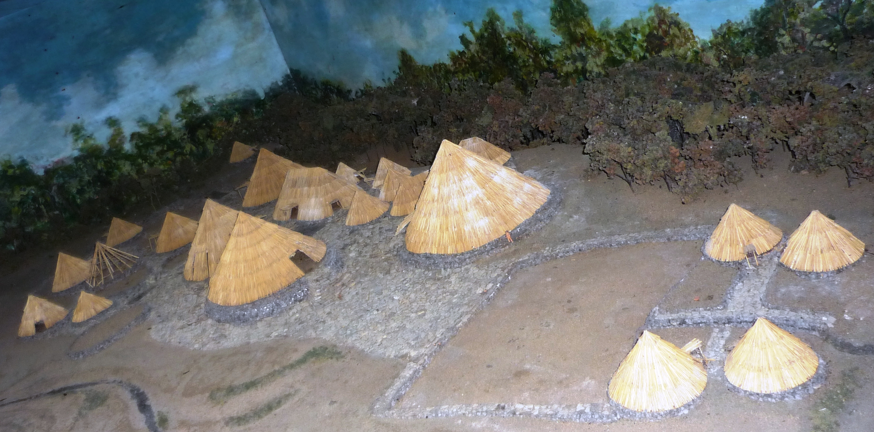 Una interpretación de como pudo ser el conjunto de edificaciones en Guayabo